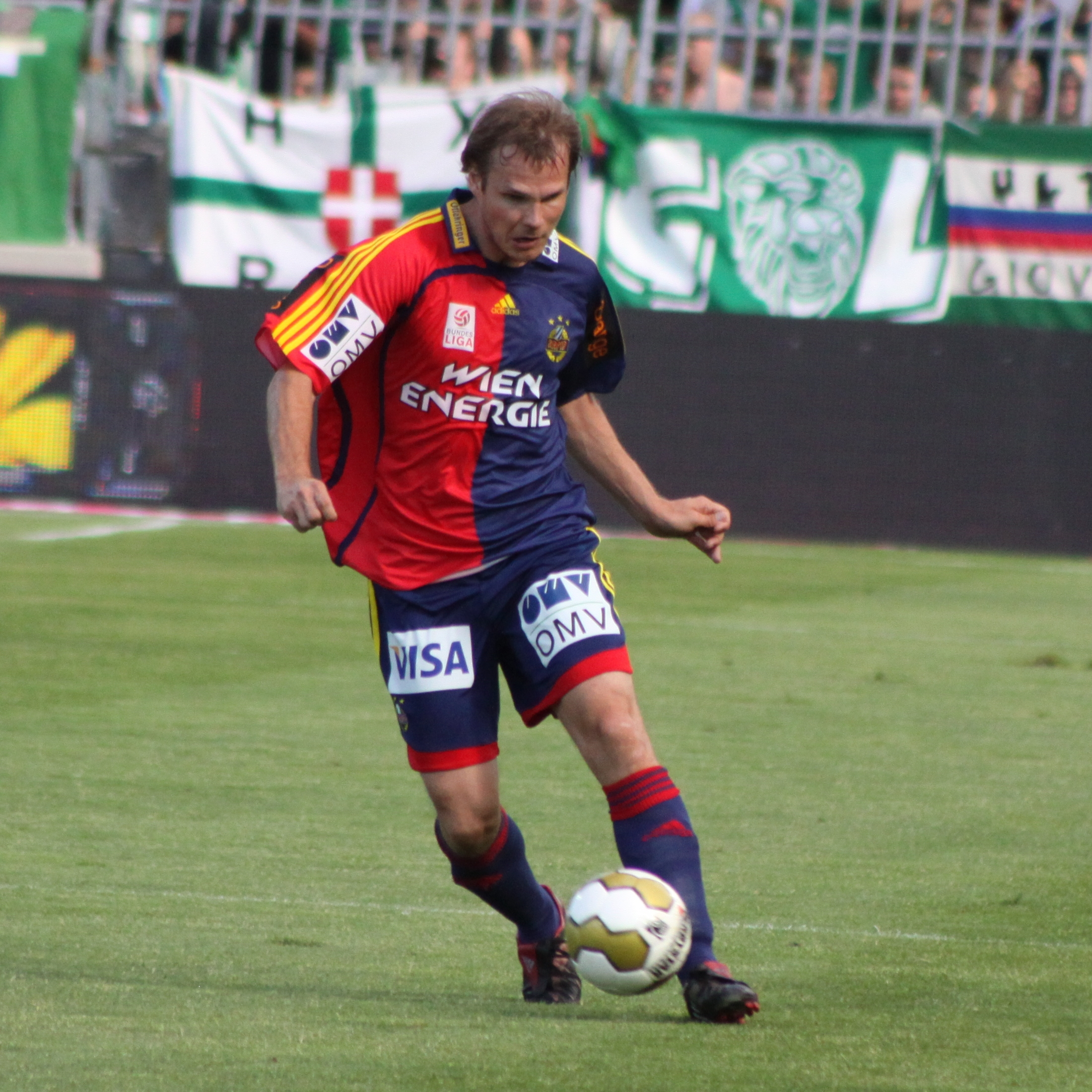 Markus Heikkinen - SK Rapid Wien (3)